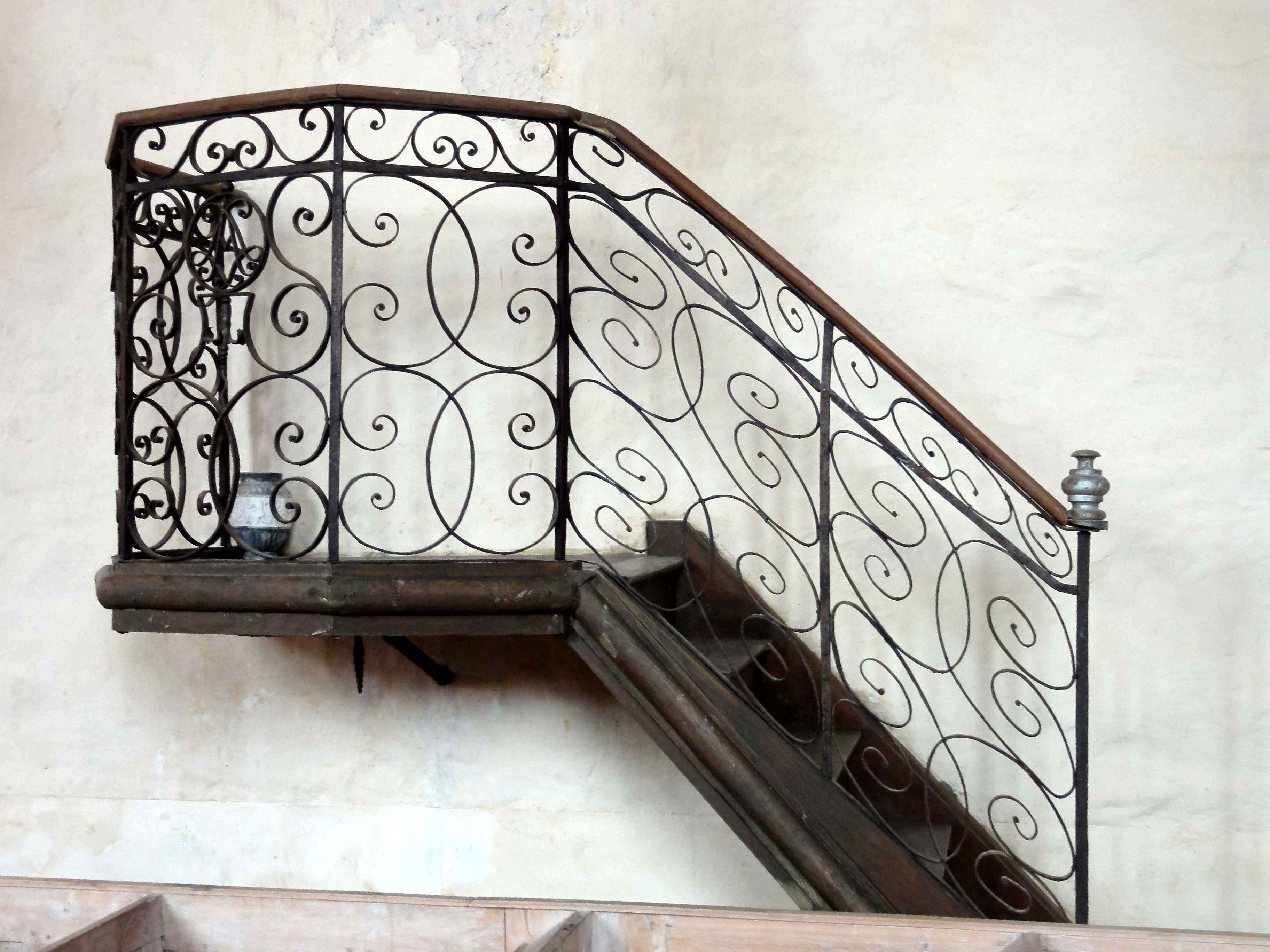 Mobilier de l'église (voir titre).